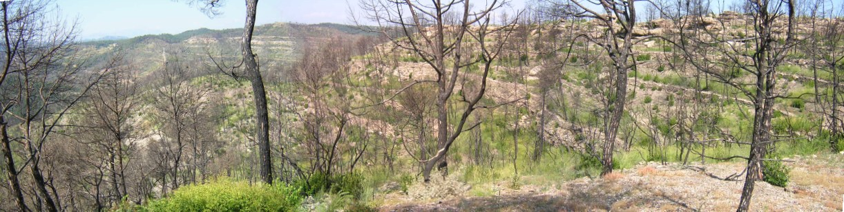 Serrat del Trompa (Monistrol de Calders, Moianès)